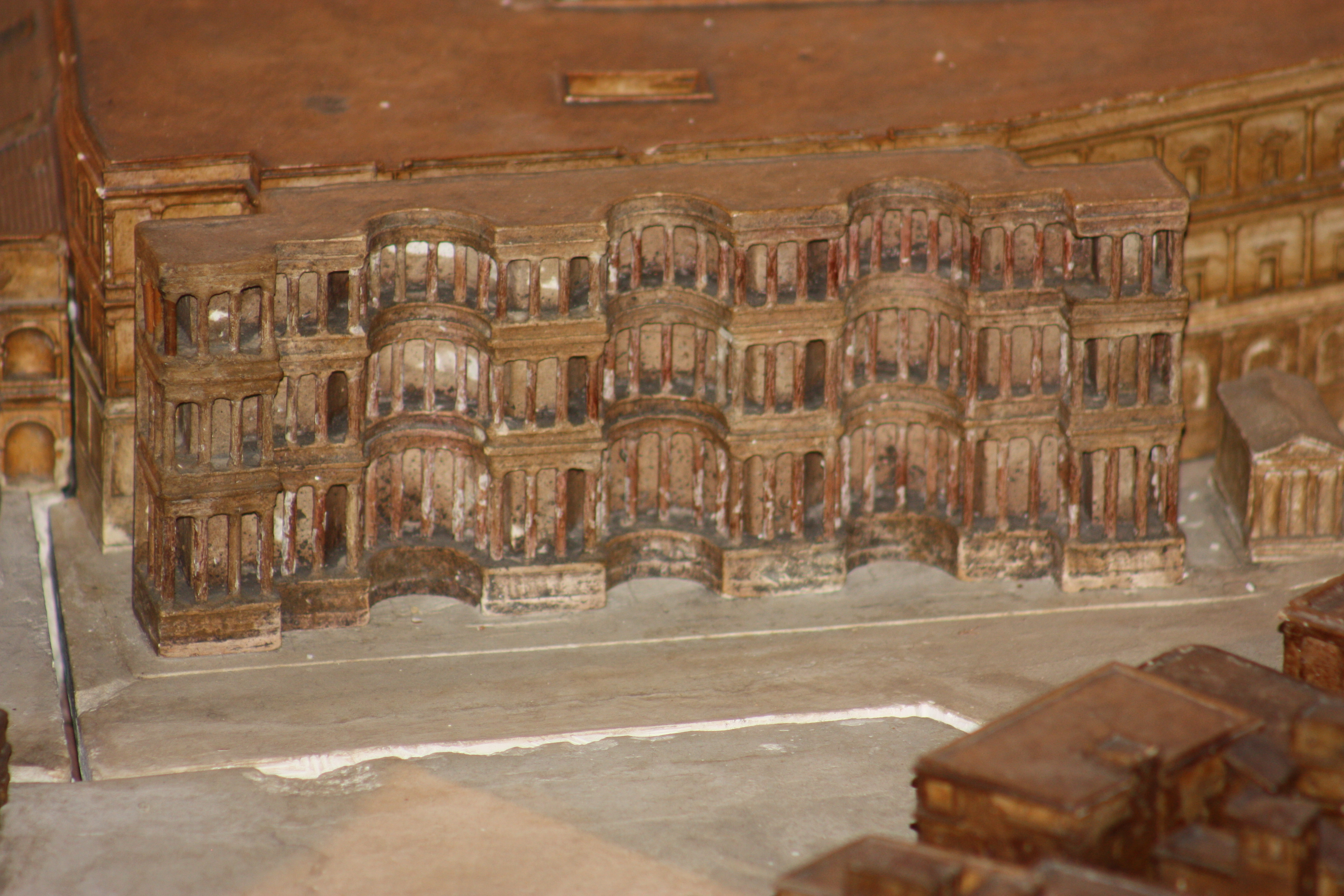 septizodium plan de rome Bigot, MRSH Caen